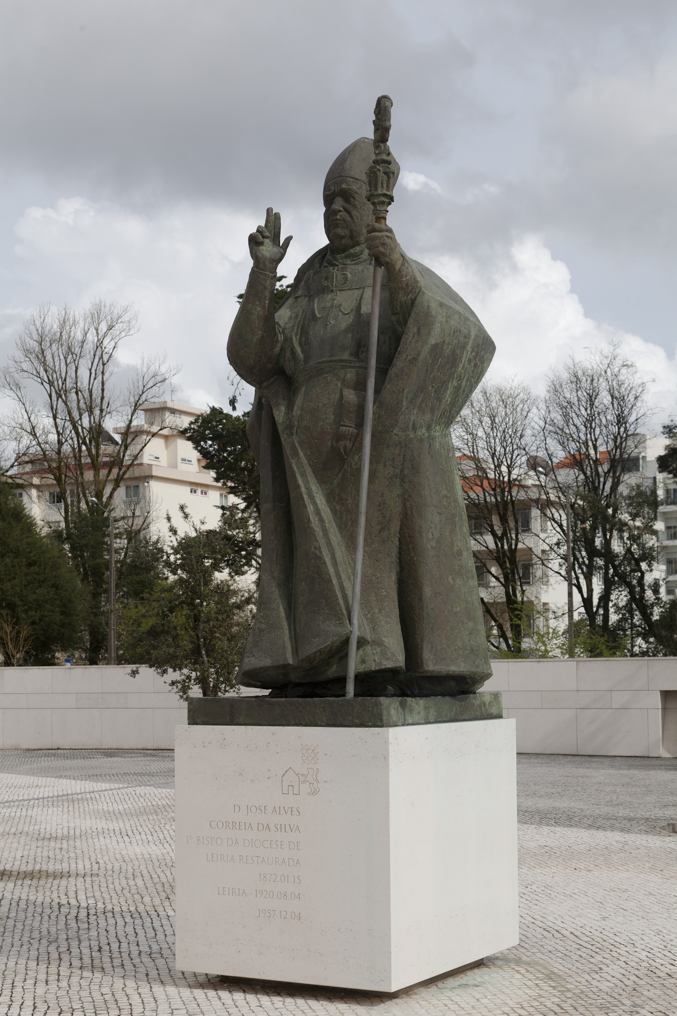 Joaquim Correia, D. José Alves Correia da Silva, 1972, bronze, Fátima